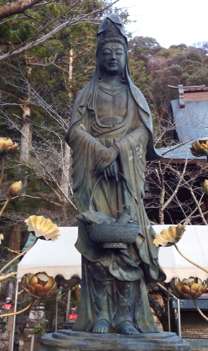 薬王寺の本堂前の魚籃観音像